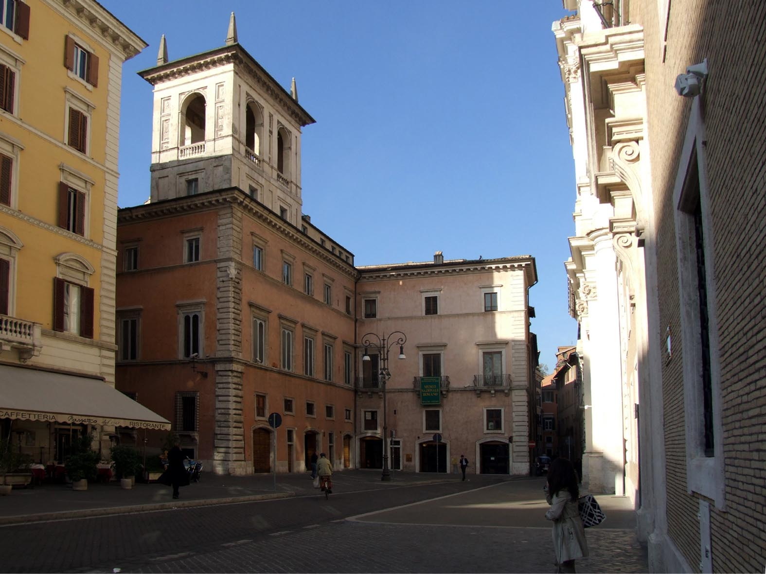 Palazzo Altemps, Roma, Facciata